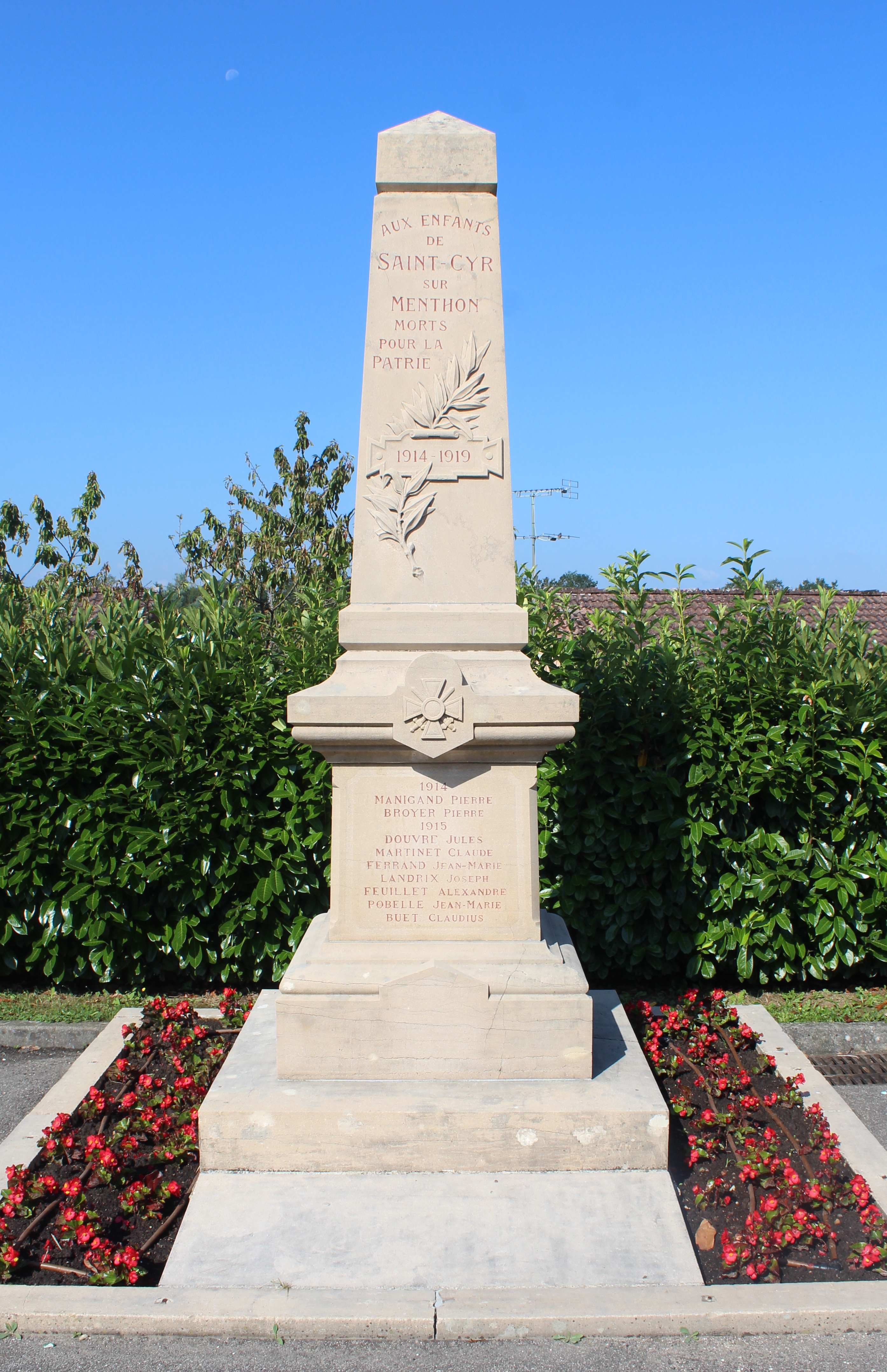 Monument en l'honneur des soldats morts de Saint-Cyr-sur-Menthon.